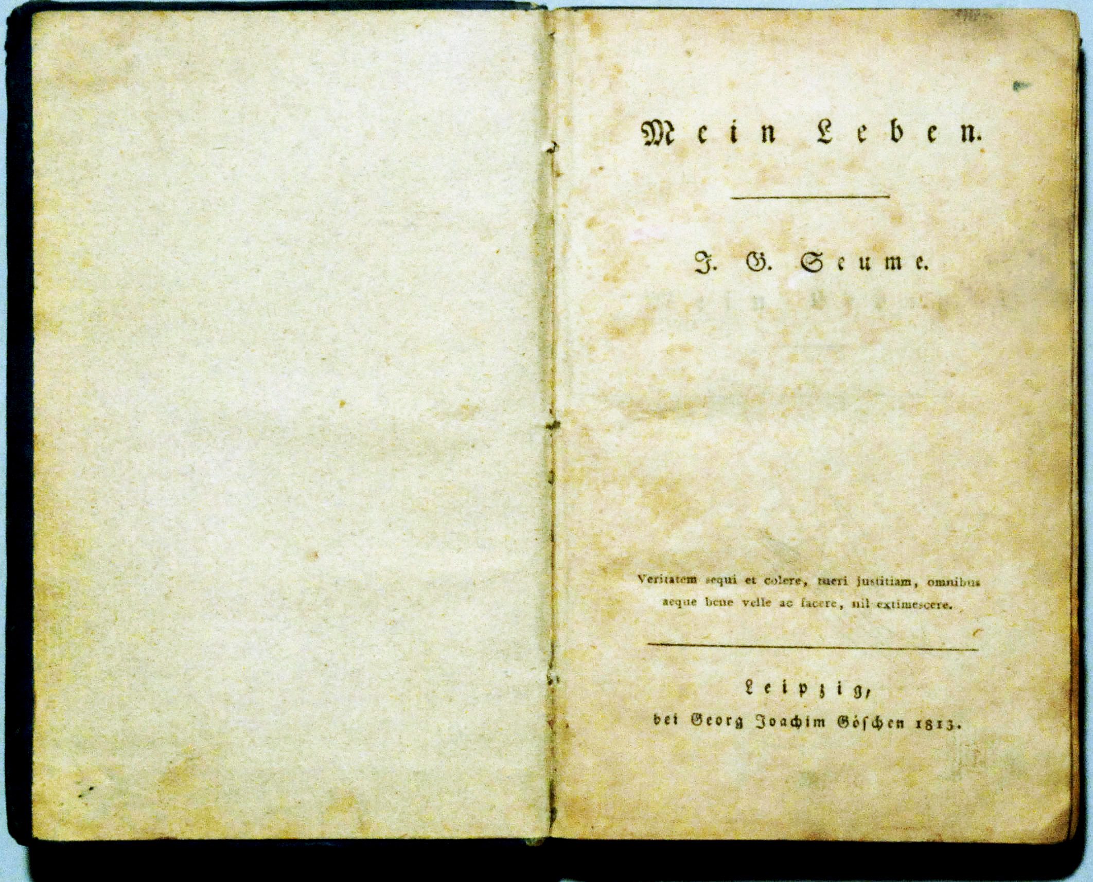 Titelblatt des Erstdruckes im Verlag von Georg Joachim Göschen, Leipzig 1813 Digitalisat der Erstausgabe mit der Ergänzung des Textes von Christian August Heinrich Clodius und Georg Joachim Göschen